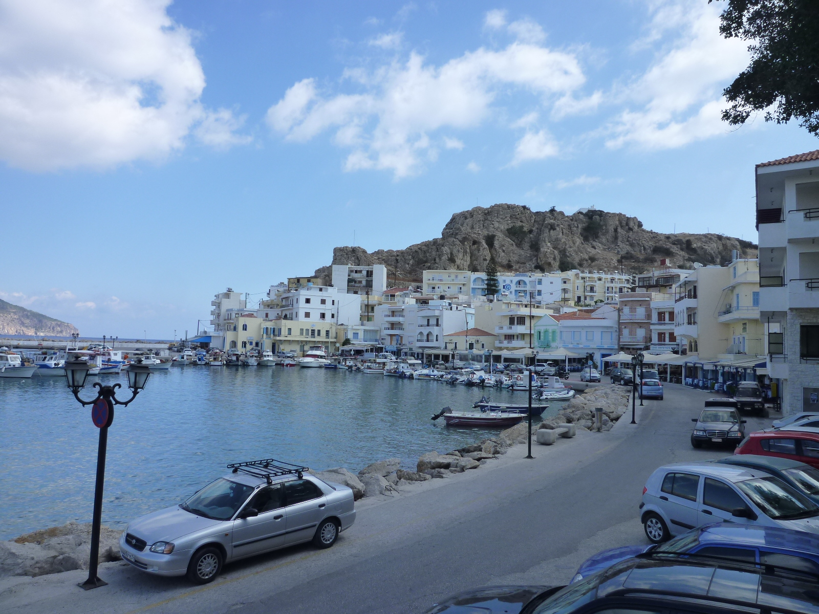 Die Hafenstraße in Pigadia